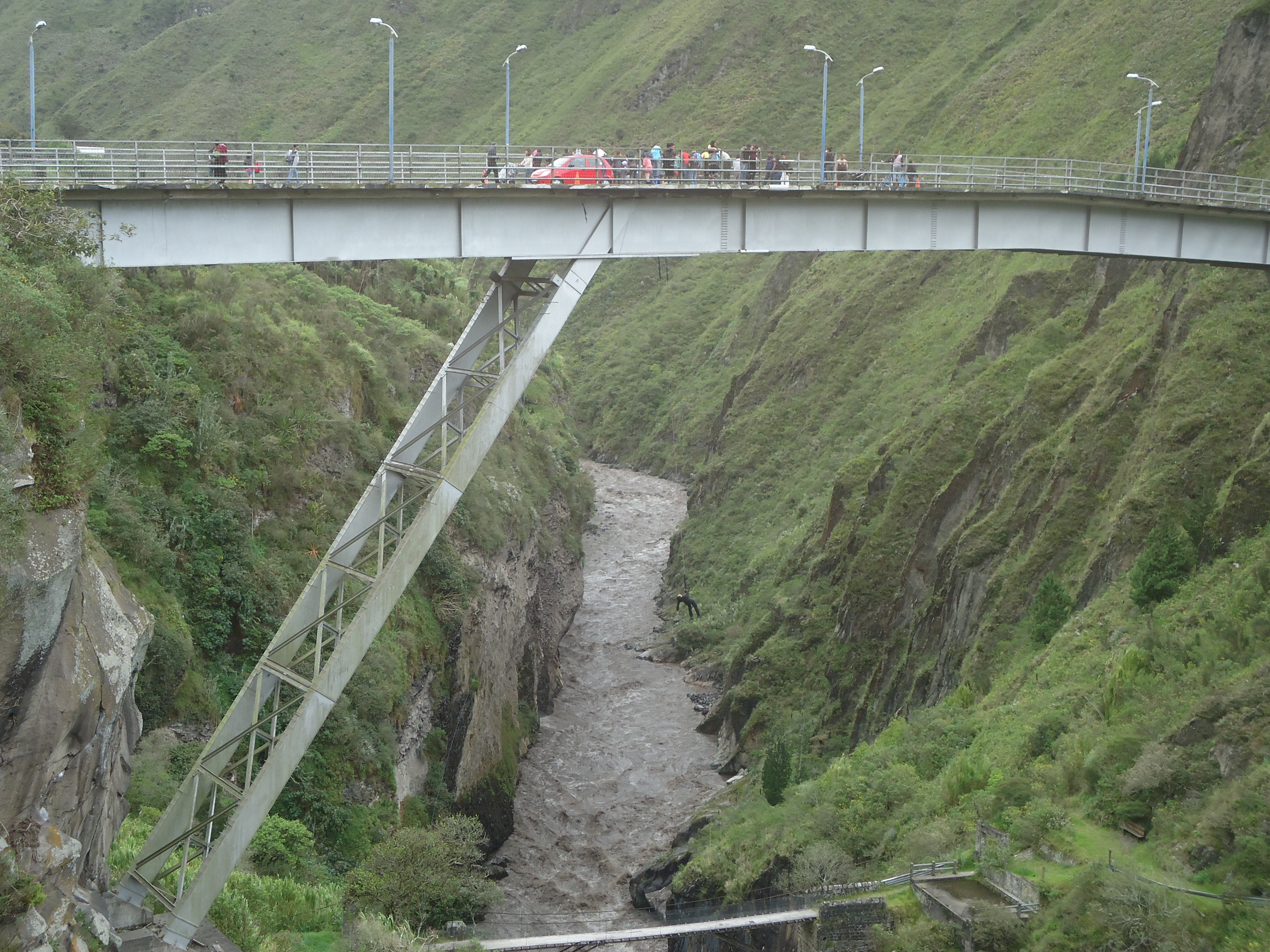 Puente de San Francisco (Baños de Agua Santa)